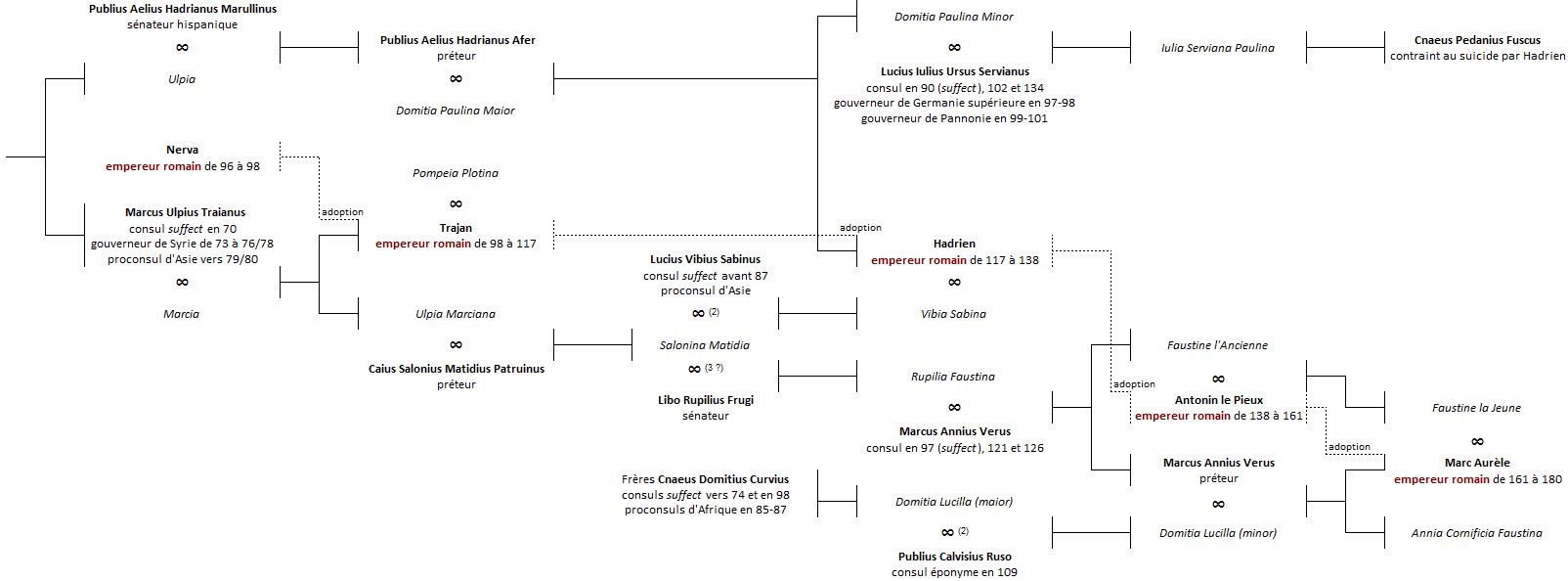 Famille de Trajan, arbre non exhaustif. Version à compléter.